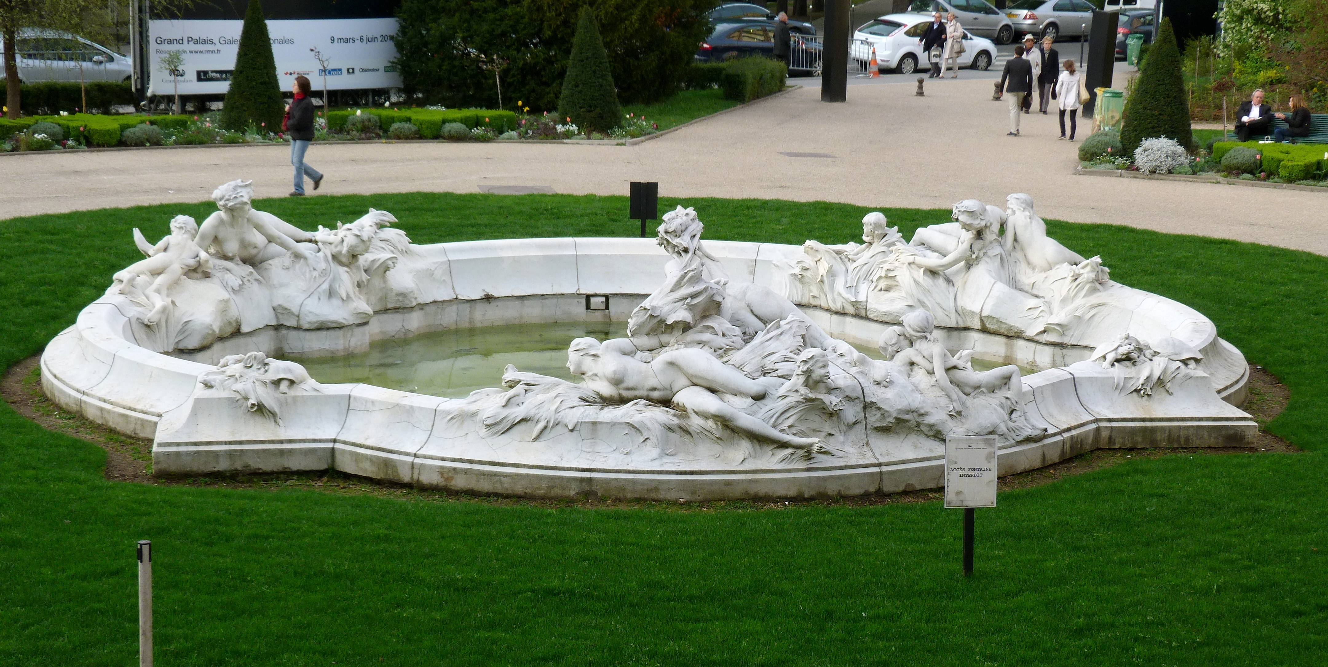 Fontaine Miroir d'eau, la Seine et ses affluents, marbre, 1910, François-Raoul Larche (1860-1912). Destinée à la place du Carrousel, la fontaine est installée dans le square Jean-Perrin, sur le côté du Grand-Palais.